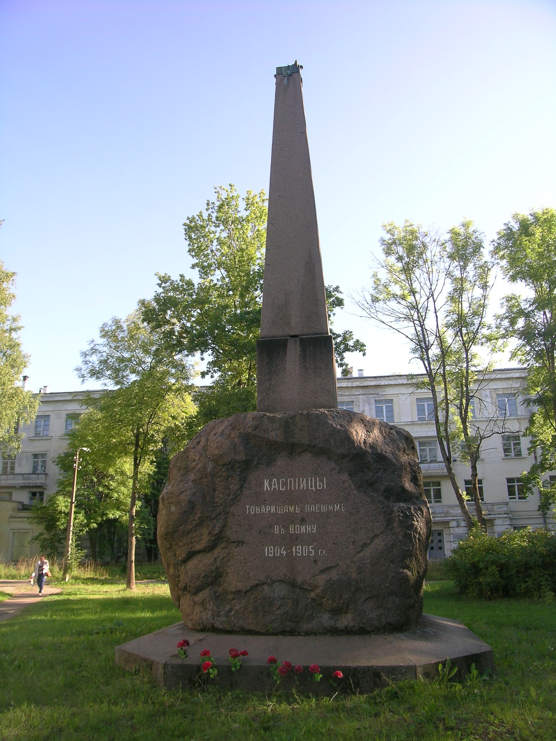 Стела в Петергофе на ул. Юты Бондаровской в сквере между домами 21, 25 и 13к1. [1] Памятник каспийцам-товарищам, павшим в войну 1904—1905 гг. Надпись: «КАСПIИЦЫ товарищамъ павшимъ въ войну 1904—1905 г.г.»